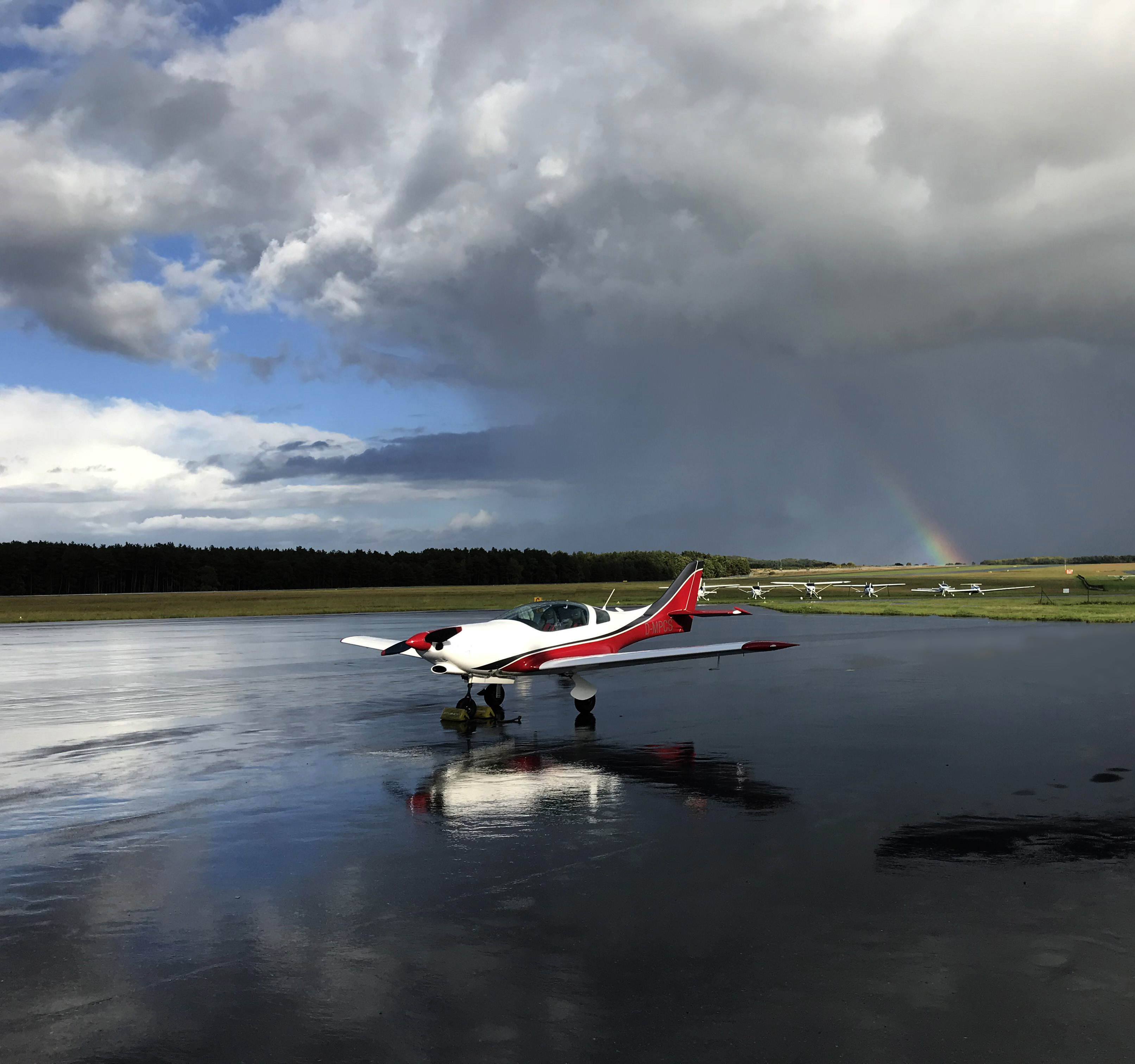 VL-3 Evolution is a low-wing, ultralight monoplane. It is here seen at Heringsdorf airport shortly after a rain shower in fall.